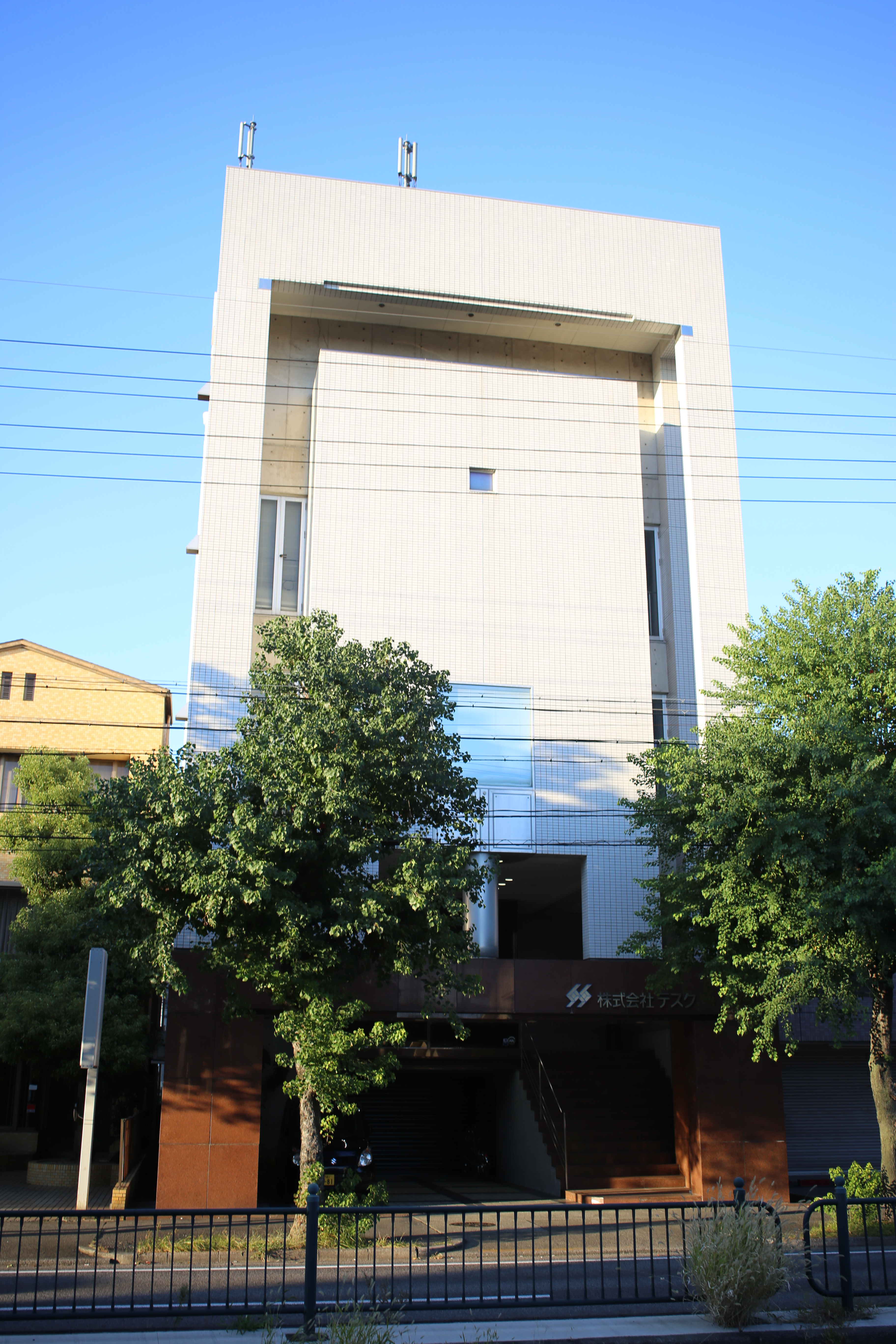 名古屋市熱田区三番町のテスク本社を南側公道西側より撮影